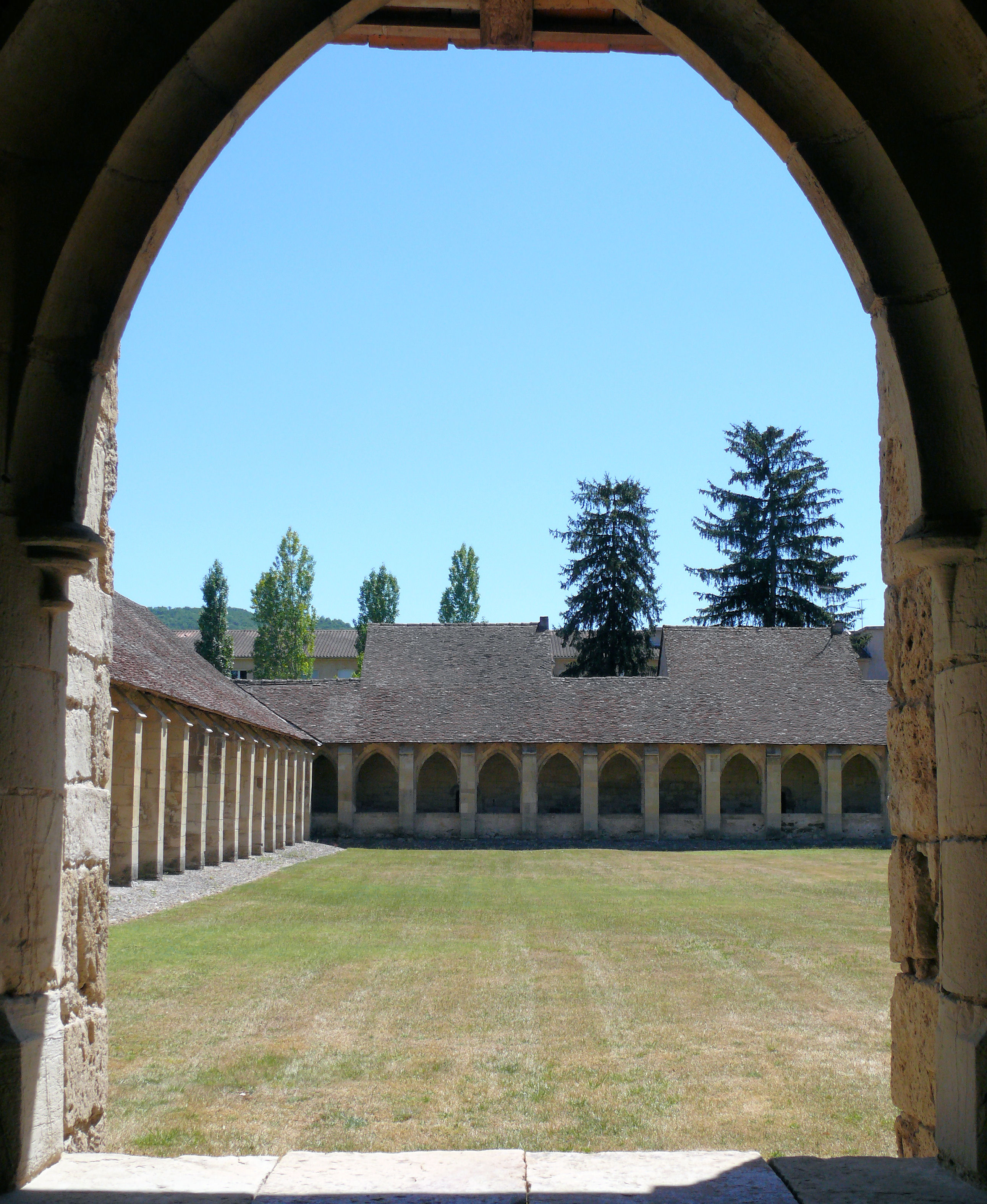 Villefranche-de-Rouergue - Chartreuse Saint-Sauveur - Baie du grand cloître